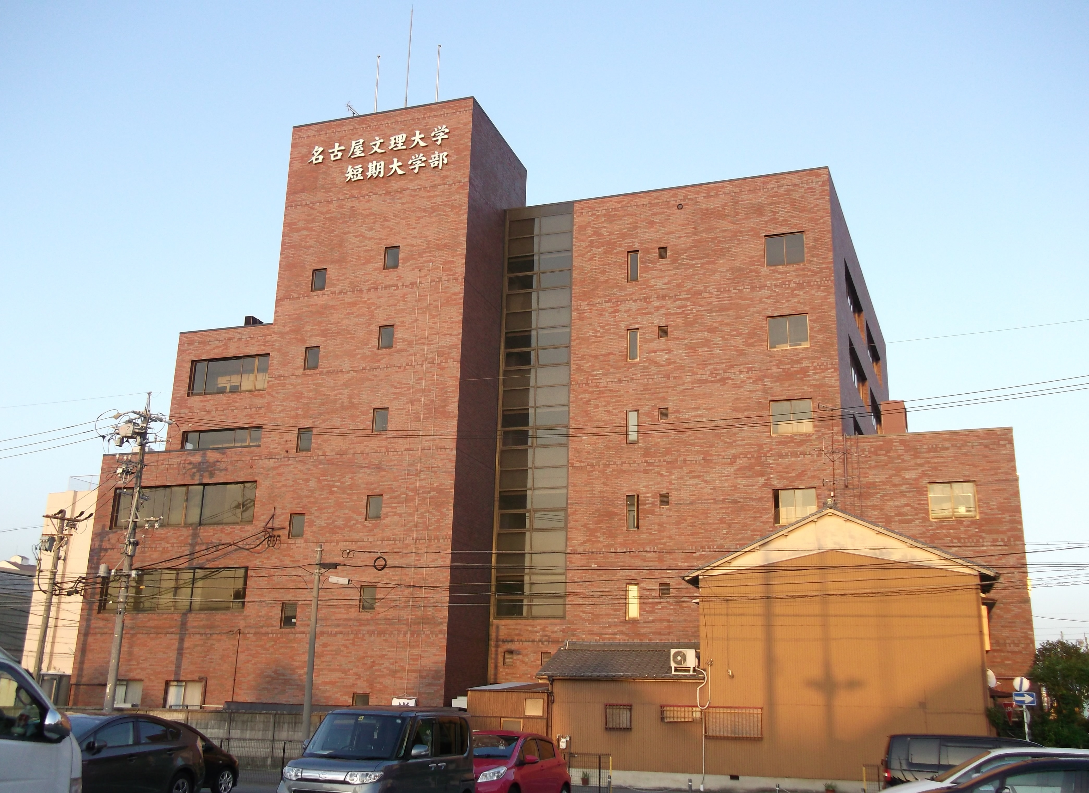 名古屋市西区笹塚町にある名古屋文理大学短期大学部を西側から写す